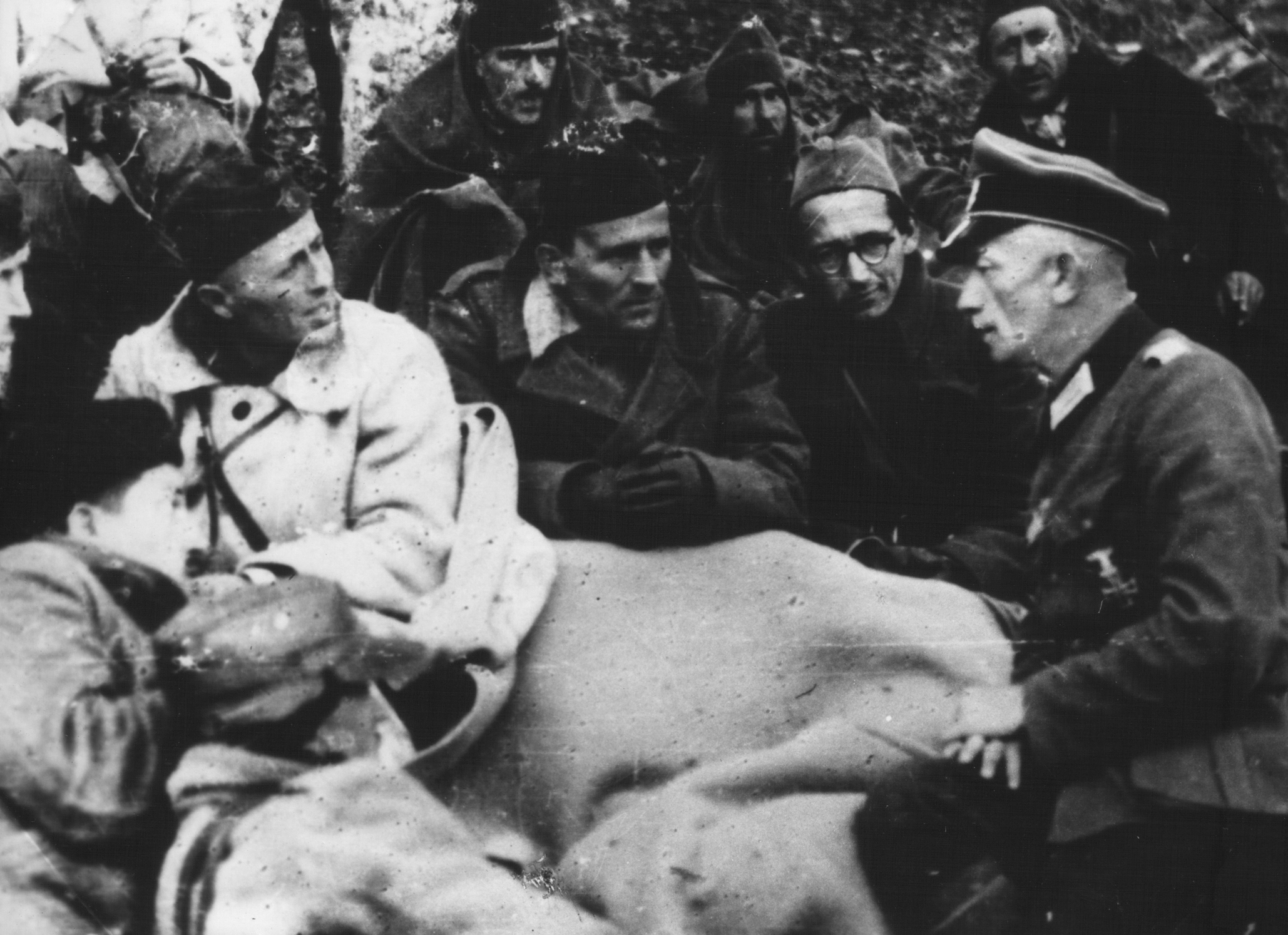 Srpskohrvatski / српскохрватски: Partizanski rukovodioci saslušavaju zarobljenog nemačkog majora Arthura Streckera, tokom bitke na Neretvi. Saslušavanje vode Peko Dapčević, komandant II proleterske divizije i Mitar Bakić, politički komesar.